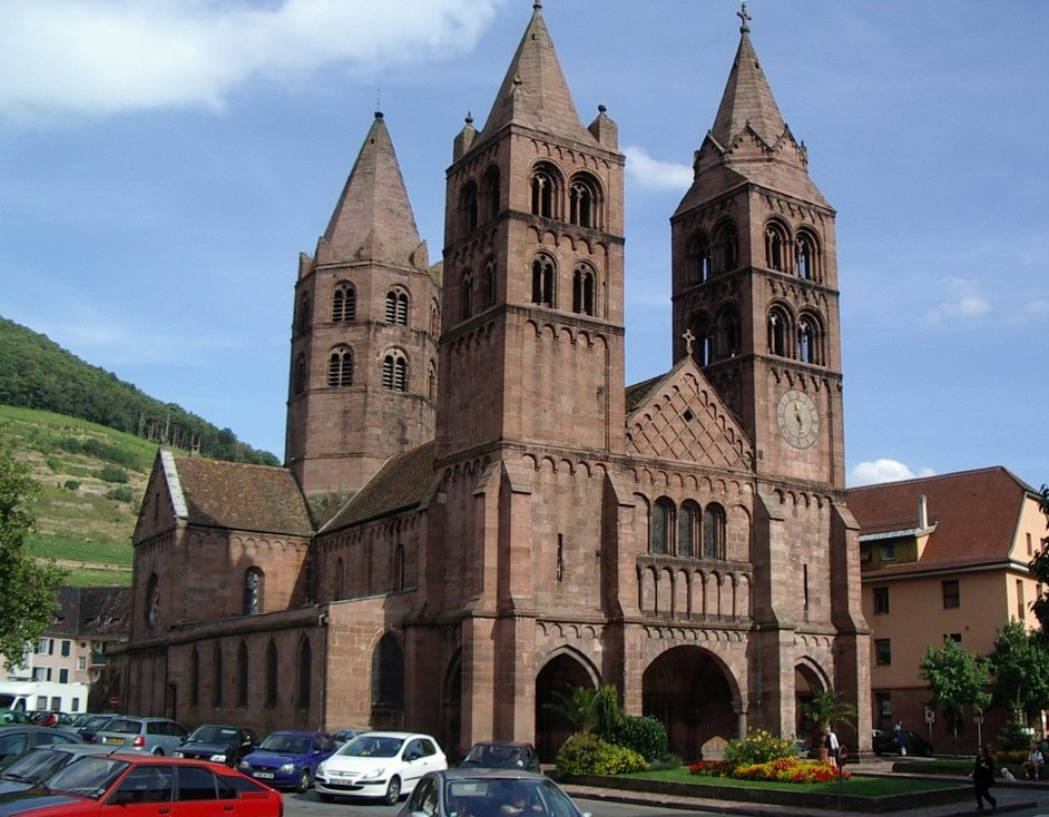 Église Saint-Léger (XIIème - XIIIème s.), Guebwiller, Haut-Rhin, Alsace, France